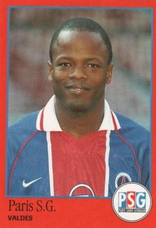 Joueur du PSG entre 1996 et 1997